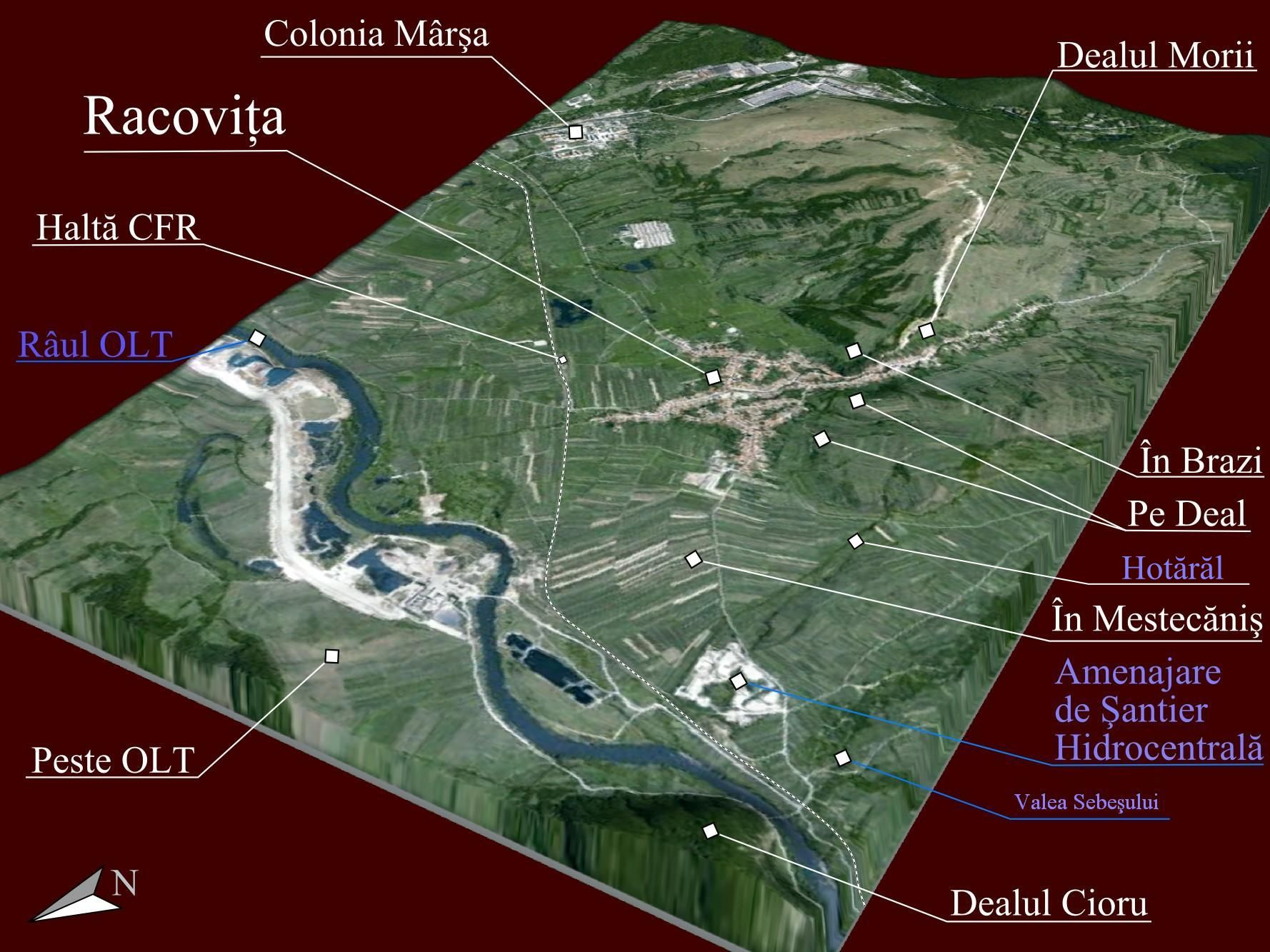 Prelucrare 3D a reliefului din Racoviţa, Sibiu.